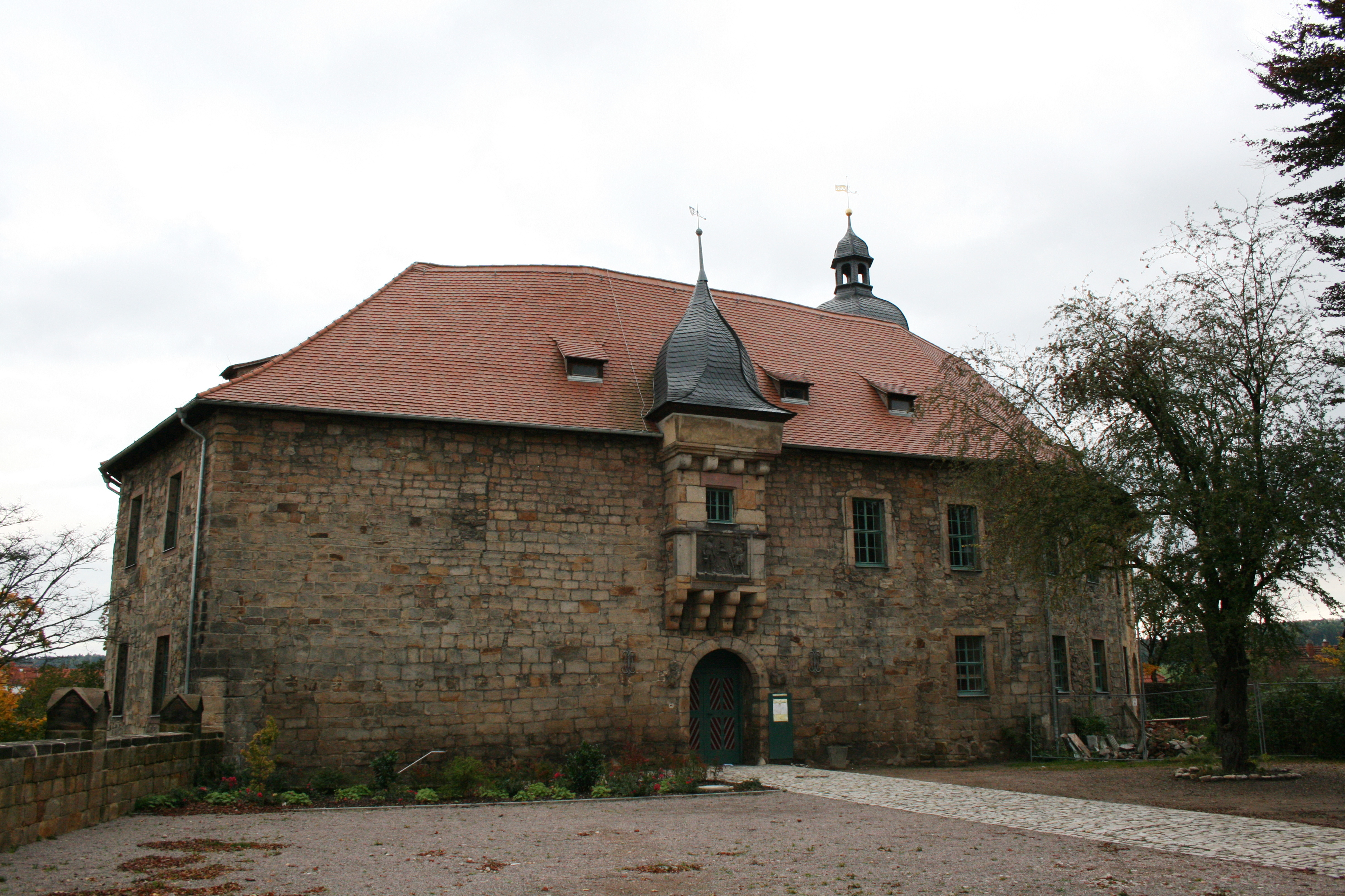 Schloss Blankenhain in der Gemeinde Blankenhain (nicht nahe Crimmitschau), Deutschland